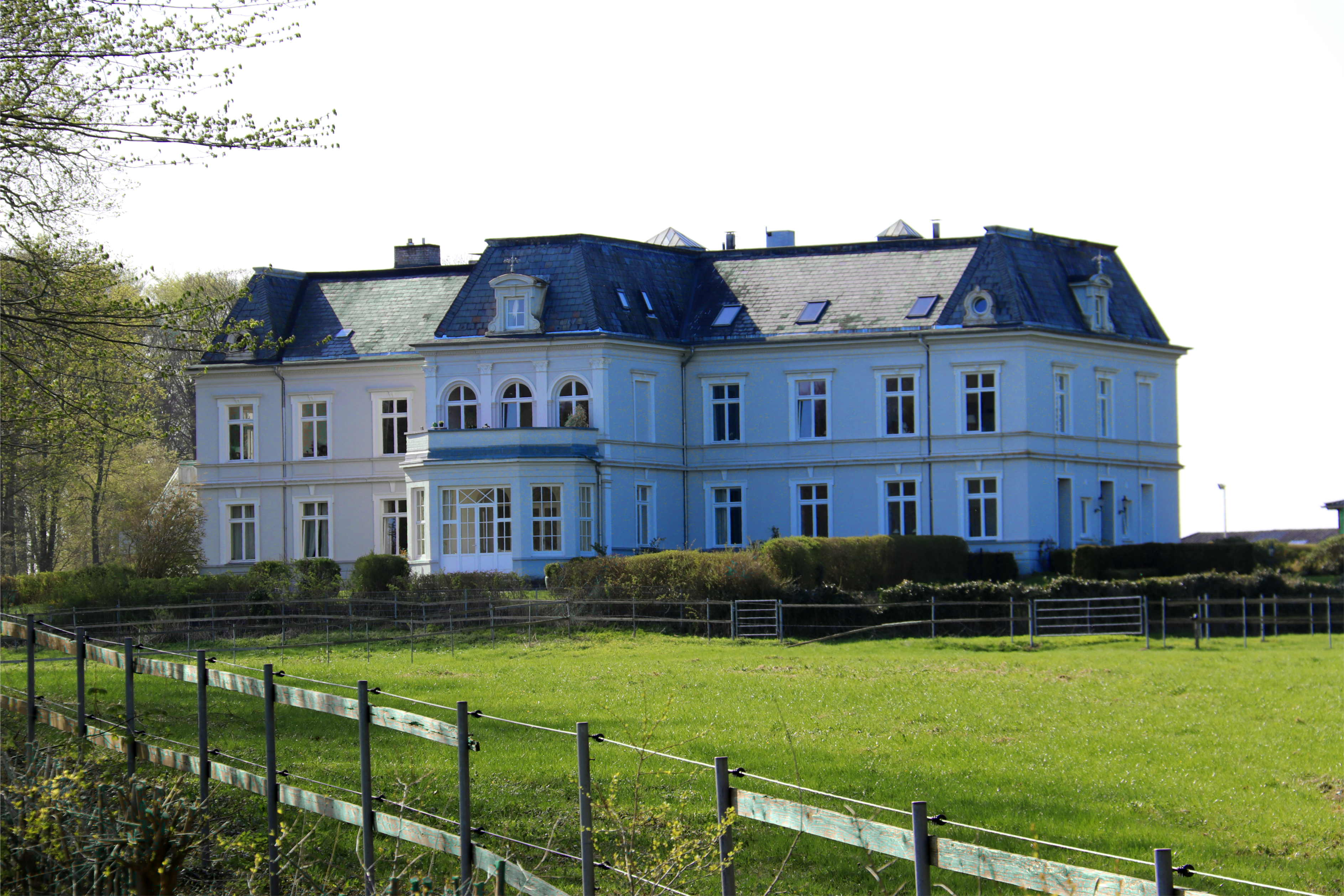 Projensdorf Gutshaus